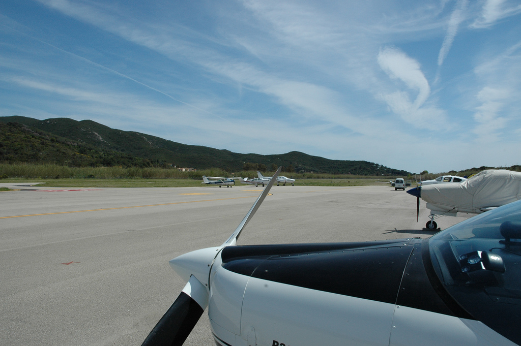 Dall'Isola d'Elba a Sabaudia, a bordo del Tecnam P2002 JF marche I-FADA. Nella foto, l'aeroporto di Marina di Campo